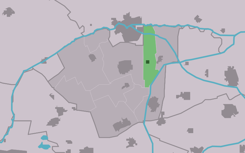 Kaartsje fan himrik fan Wâlterswâld